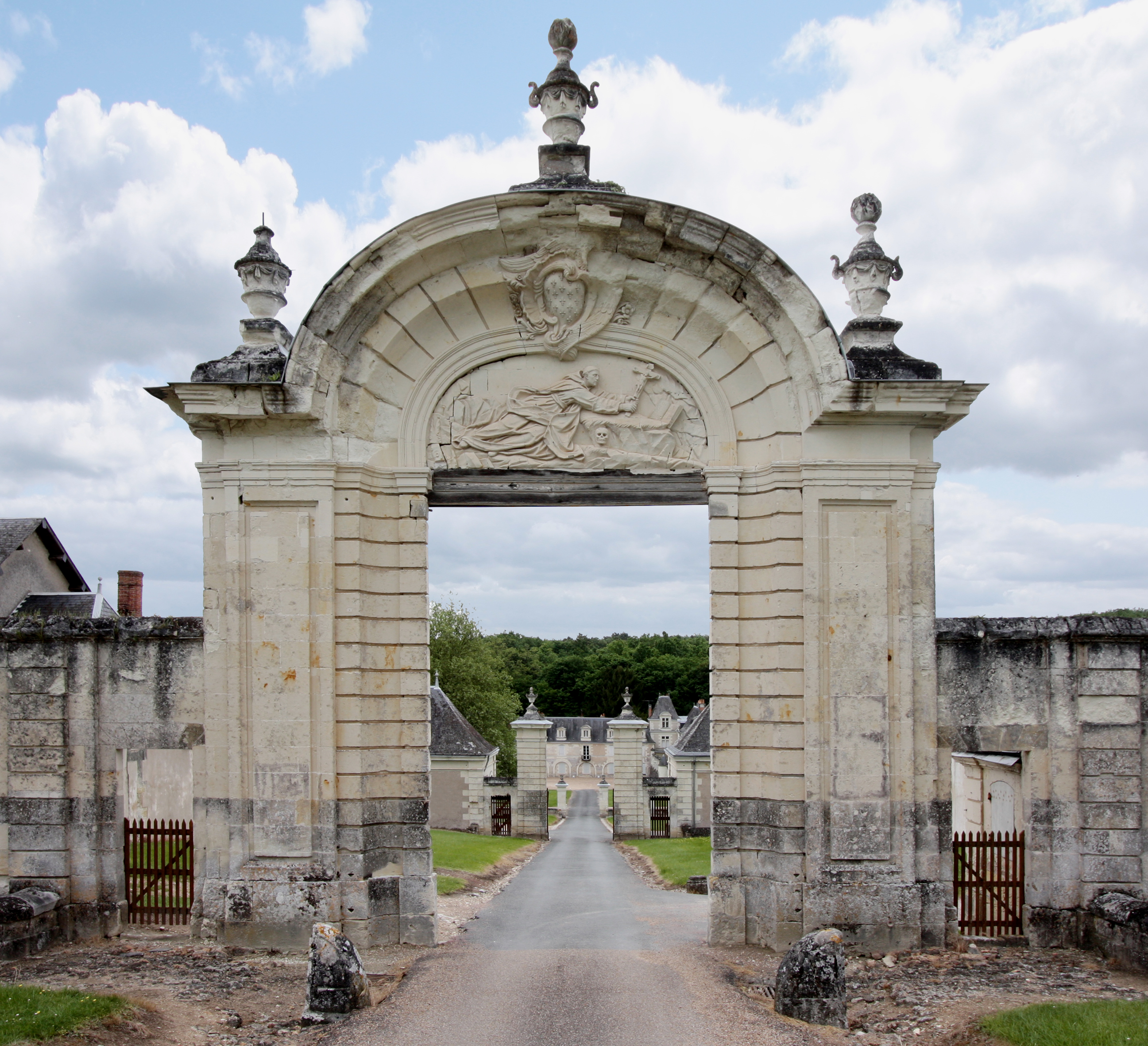 In der Nähe der Ortschaft Montrésor im Département Indre-et-Loire/Frankreich liegt das Kartäuser-Kloster Le Liget - Wirtschaftsgebäude